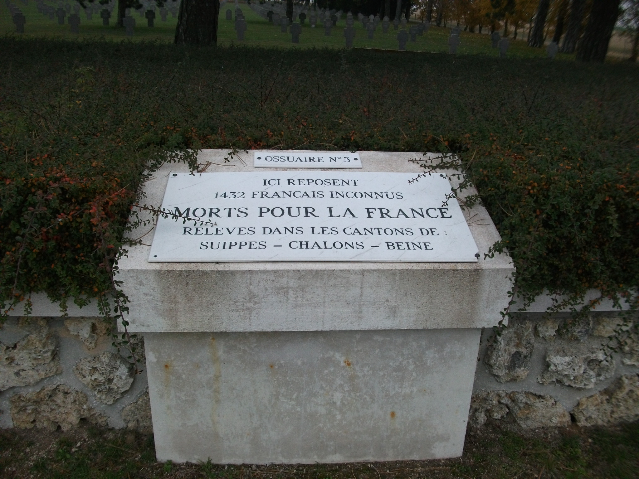 Nécropole nationale (Aubérive), ossuaire n°3 contenant 1432 corps de soldats français morts à Suippes, Beine Nauroy et Châlons sur MArne.